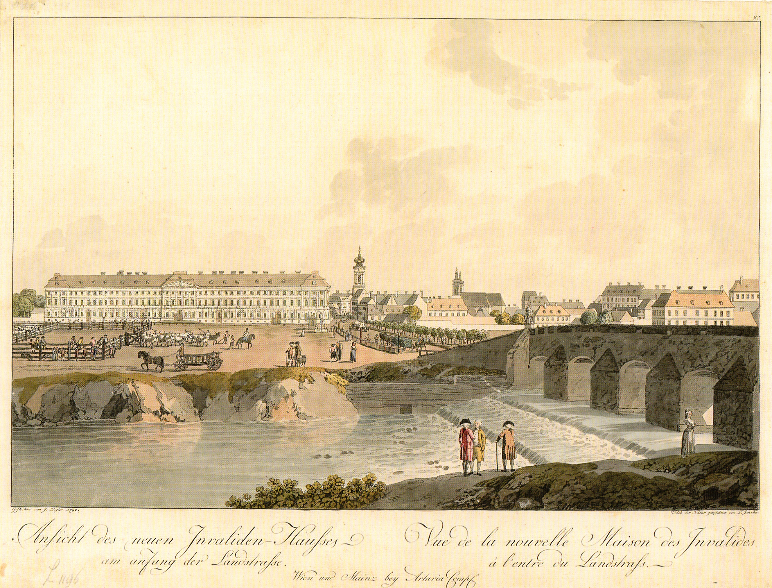 Ansicht des neuen Invalidenhauses am anfang der Landstrasse. Kupferstich und Radierung, koloriert. Gestochen von J. Ziegler 1792. Nach der Natur gezeichnet von L. Janscha. Im Vordergrund der Wienfluss; rechts neben dem Invalidenhaus die Landstraßer Hauptstraße mit der Elisabethinenkirche; rechts davon im Hintergrund die Türme der Rochuskirche.